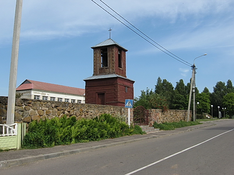 Граўжышкі. Тэрыторыя, дзе размяшчаўся Георгіеўскі касцёл